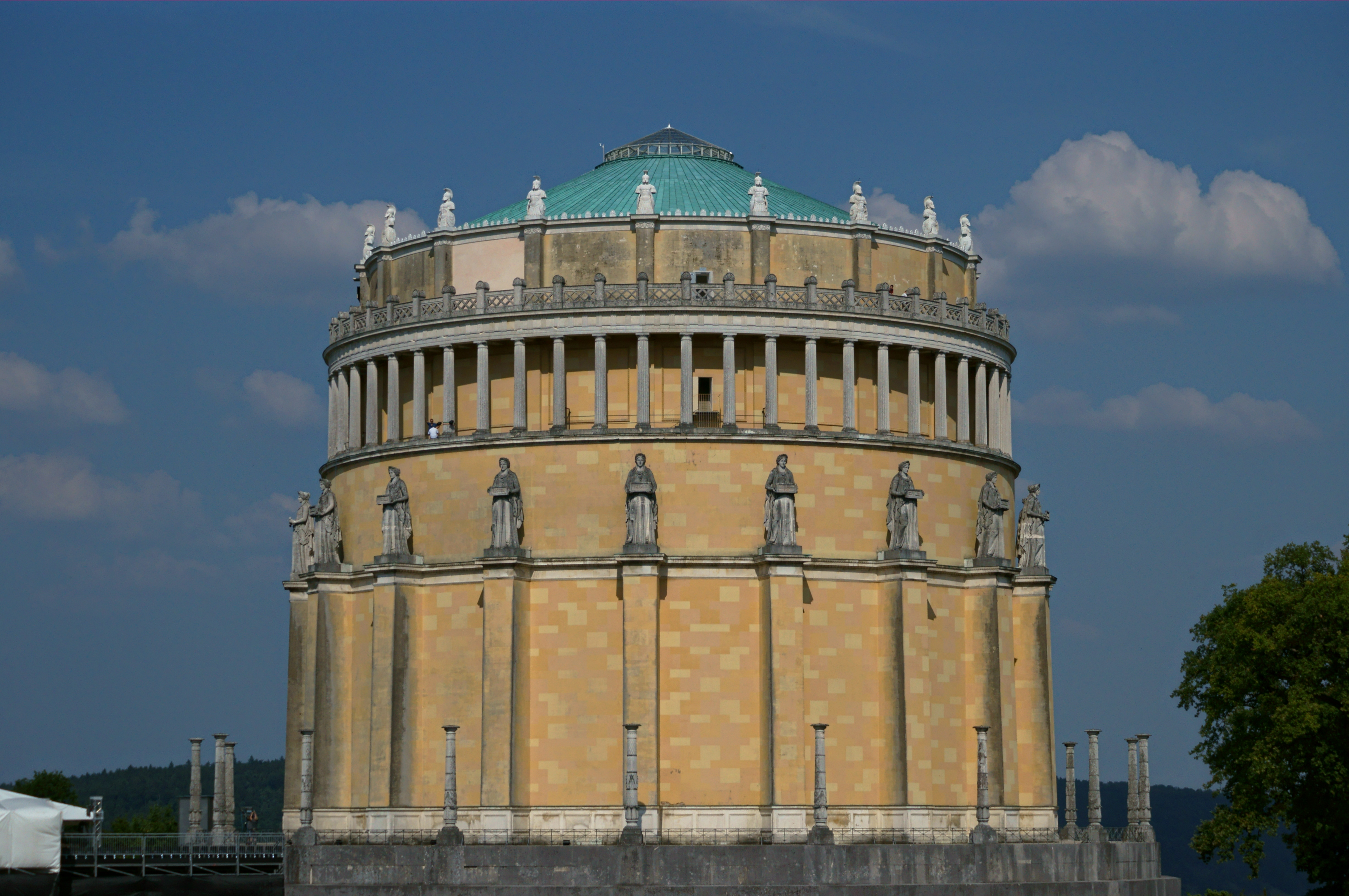 Hinteransicht der Befreiungshalle bei Kelheim